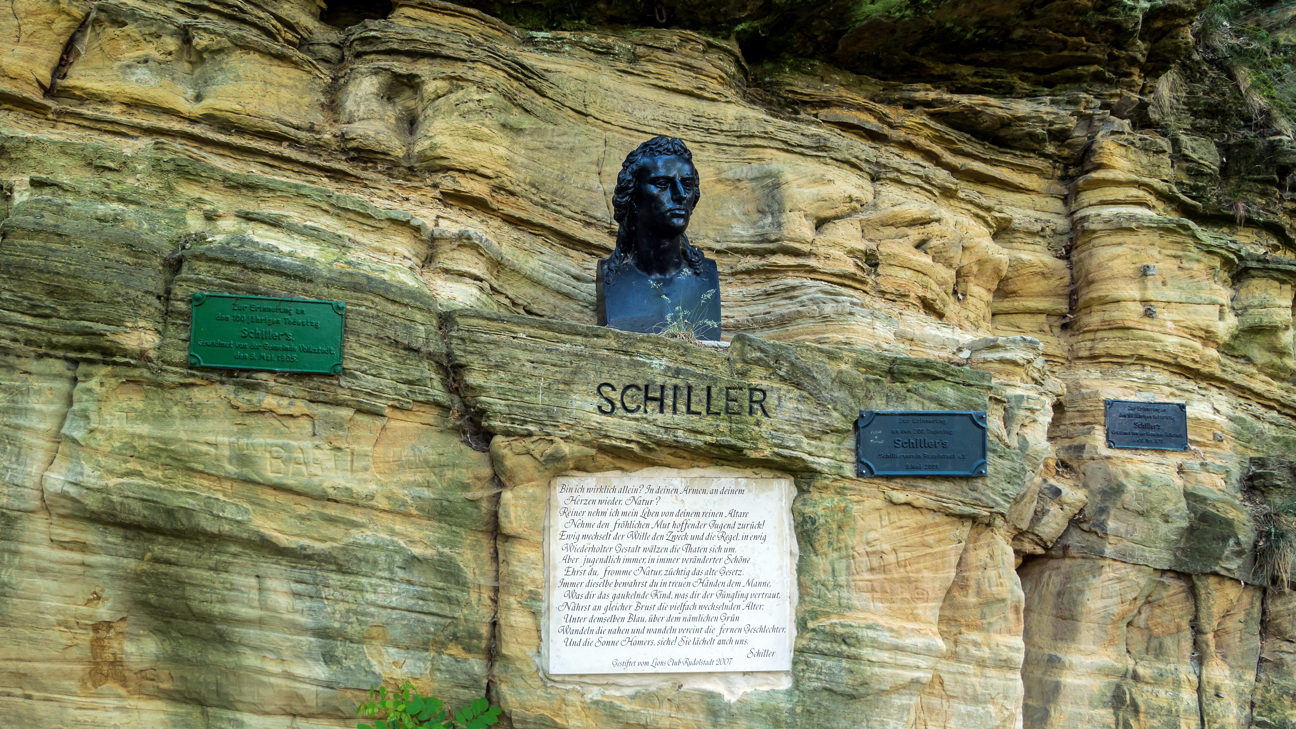 Schillerdenkmal in Rudolstadt-Volkstedt Nähe Riviera